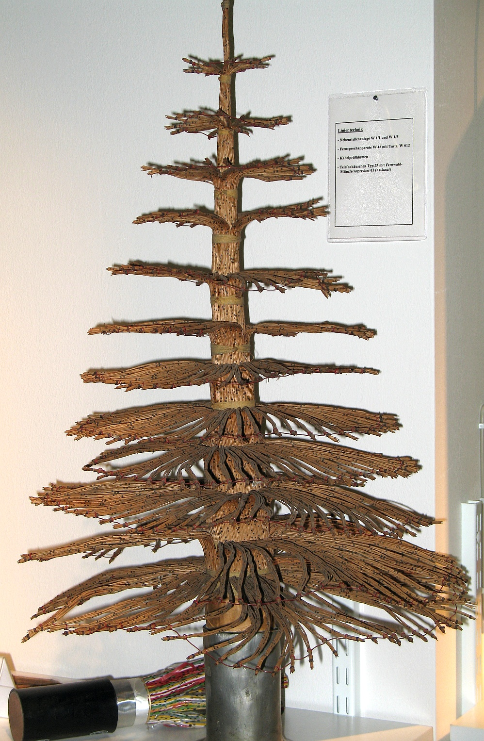 Kabelprüfblume eines Telefon-Hauptkabels im Fernmeldemuseum Aachen